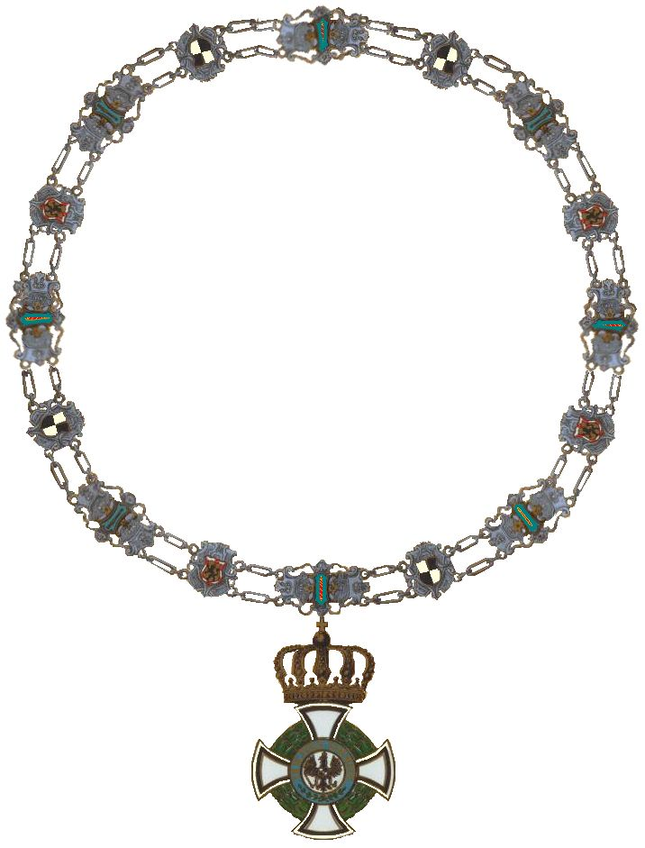 Huisorde van Hohenzollern; keten